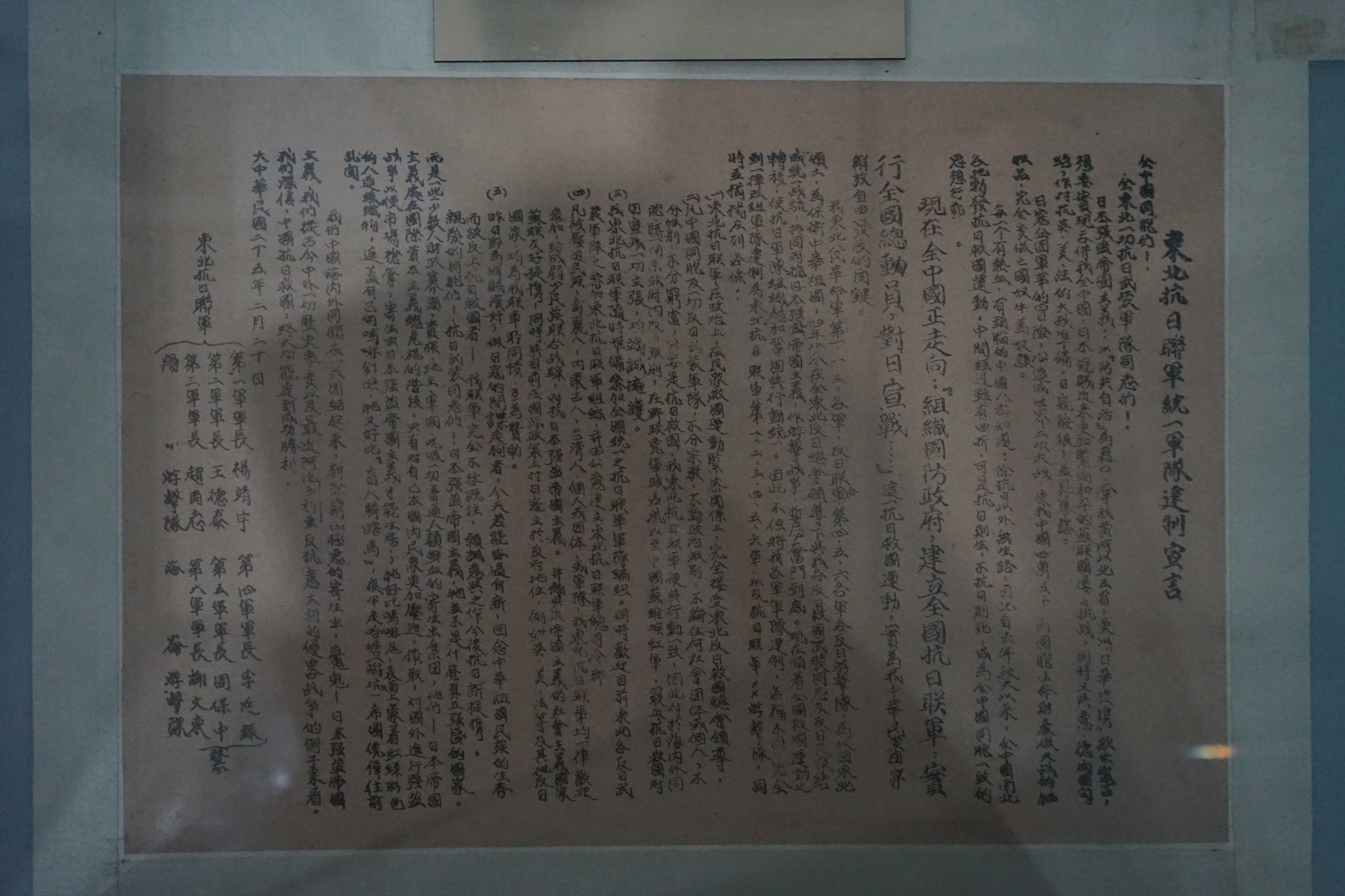 1936年2月20日，中共驻共产国际代表团以抗日将领的名义，发表了《东北抗日联军统一军队建制宣言》